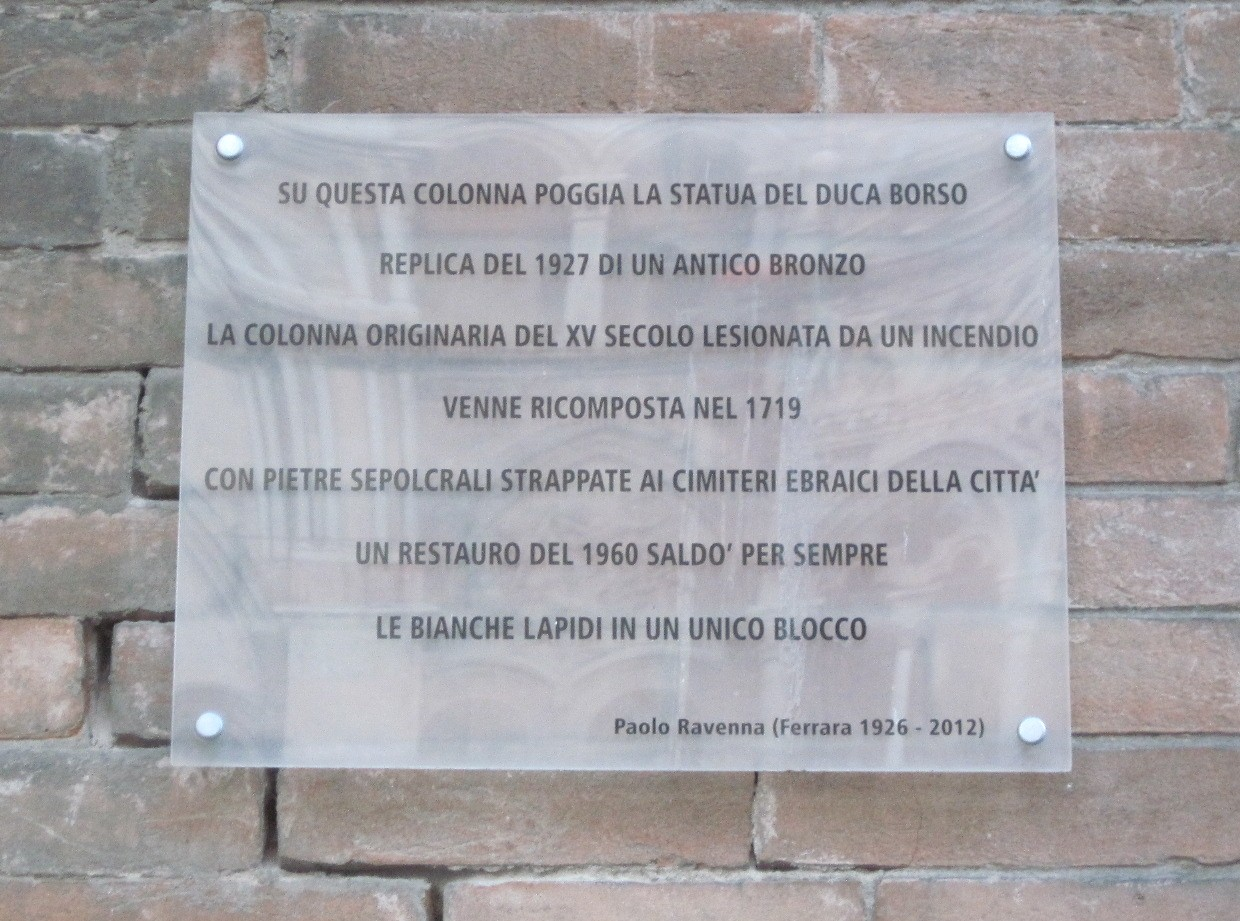 Ferrara, Palazzo comunale, Parole di Paolo Ravenna di fianco alla colonna del duca Borso d'Este che ricordano la provenienza del marmo usato per costruire la colonna.